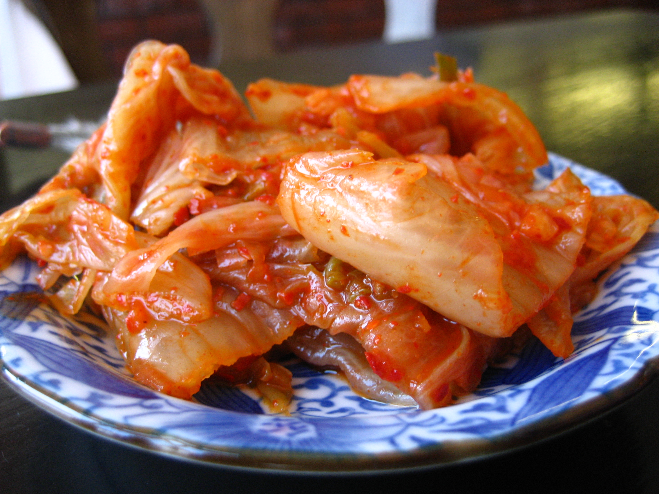 Kimchi